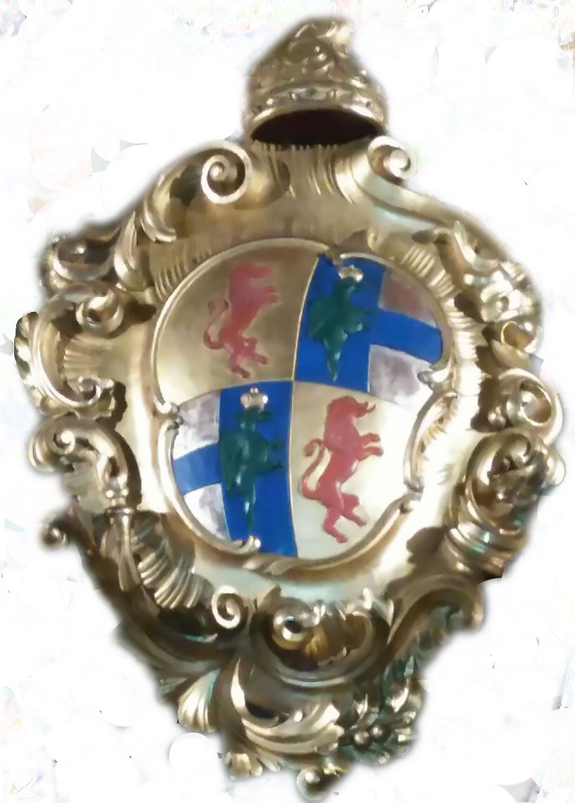 Stemma dei Conti Manin